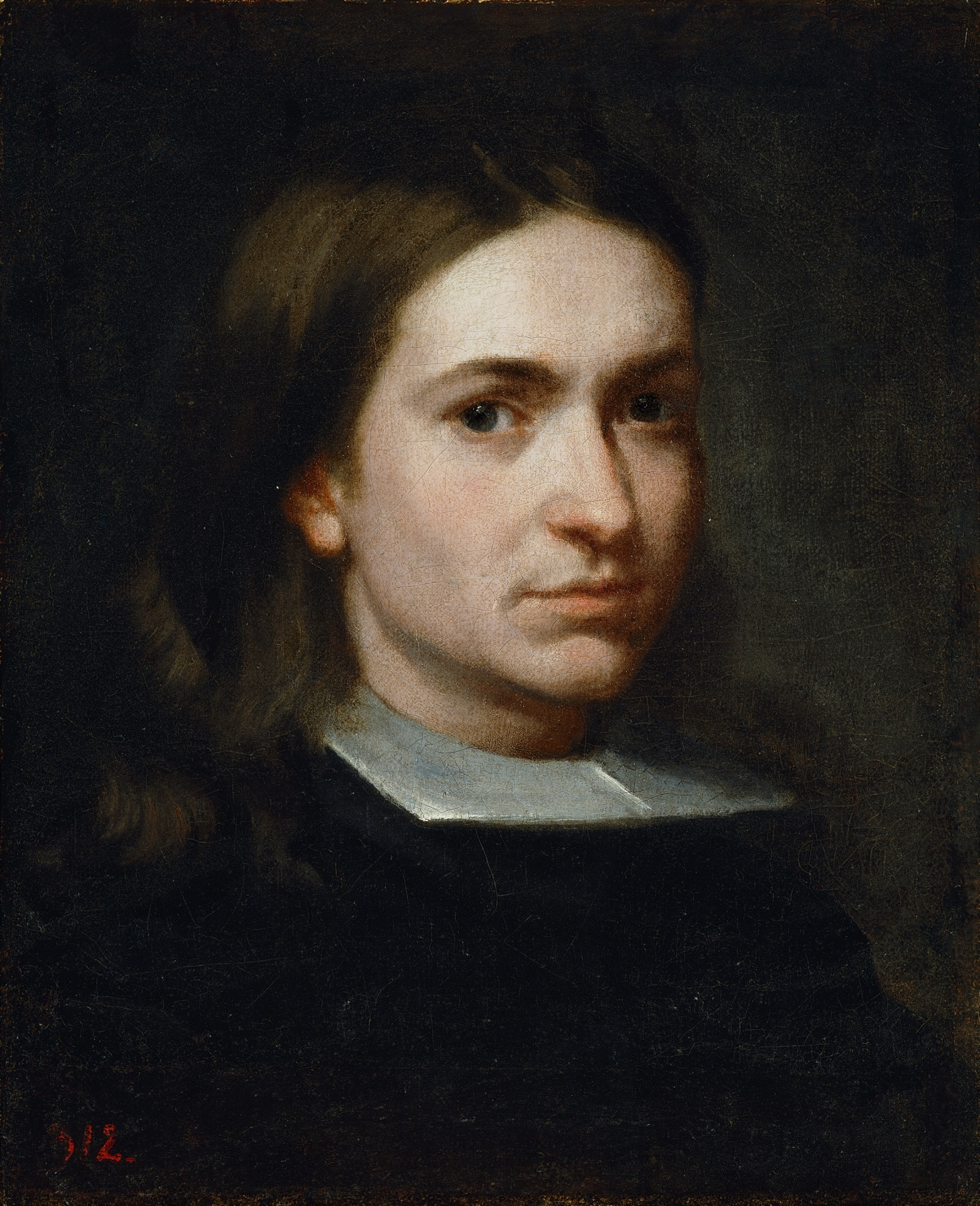 Posible autorretrato del pintor español Sebastián Muñoz († 1690).